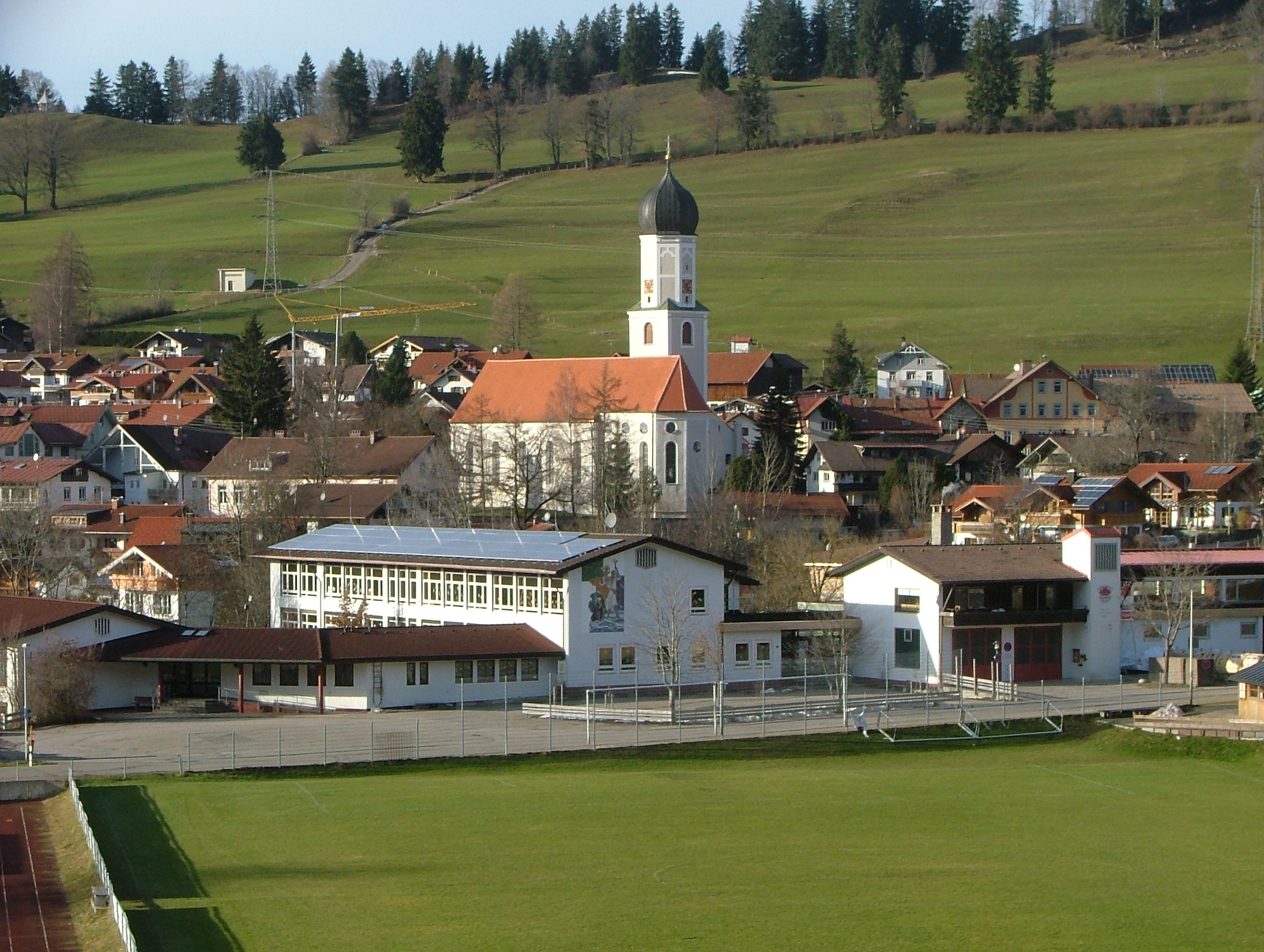 Foto von Süden